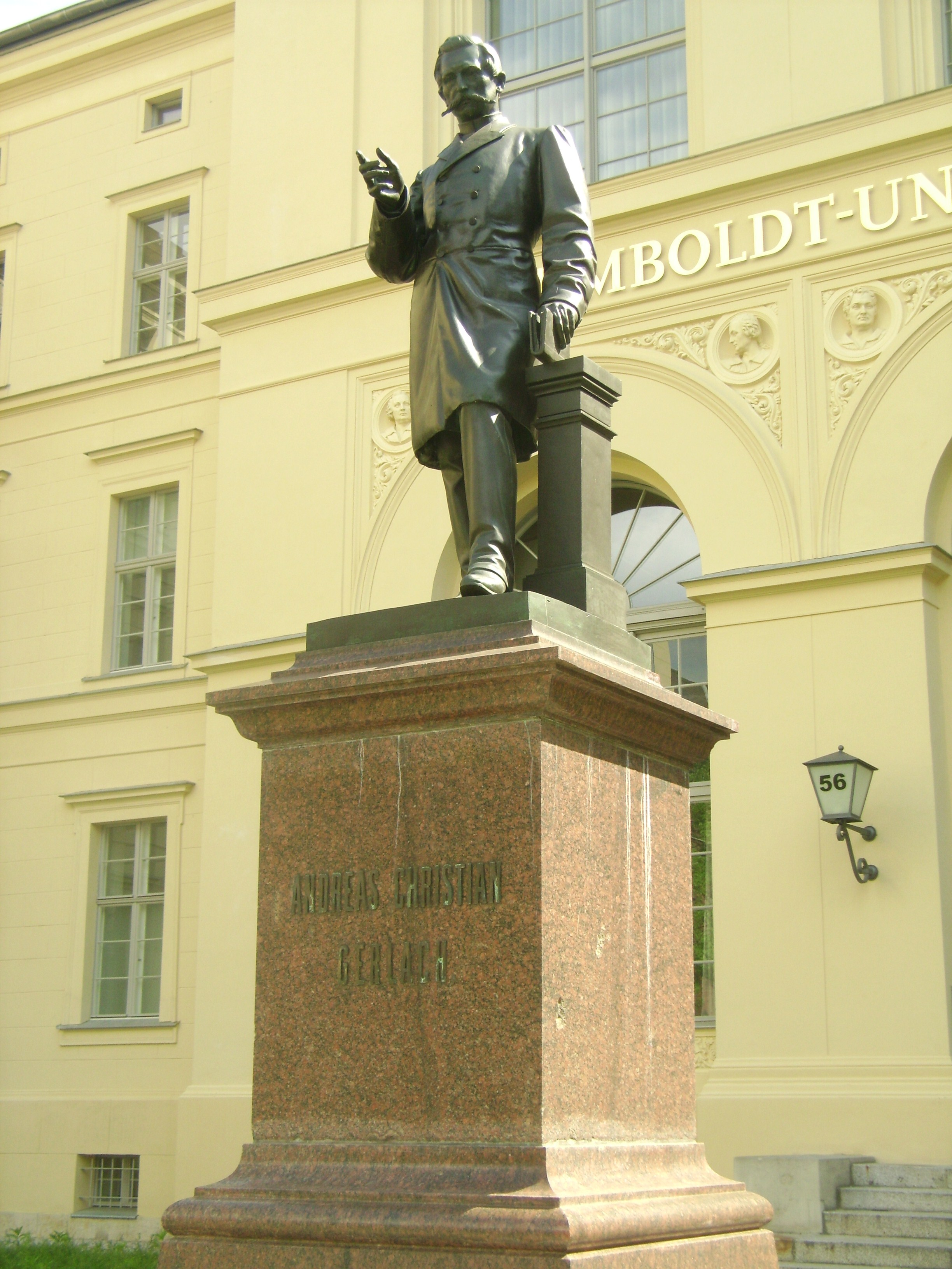 Denkmal von Andreas Christian Gerlach (1811-1877) im Ehrenhof der Veterinärmedizinischen Fakultät der Humboldt-Universität in Berlin, Luisenstraße 56, geschaffen von Otto Panzner 1890